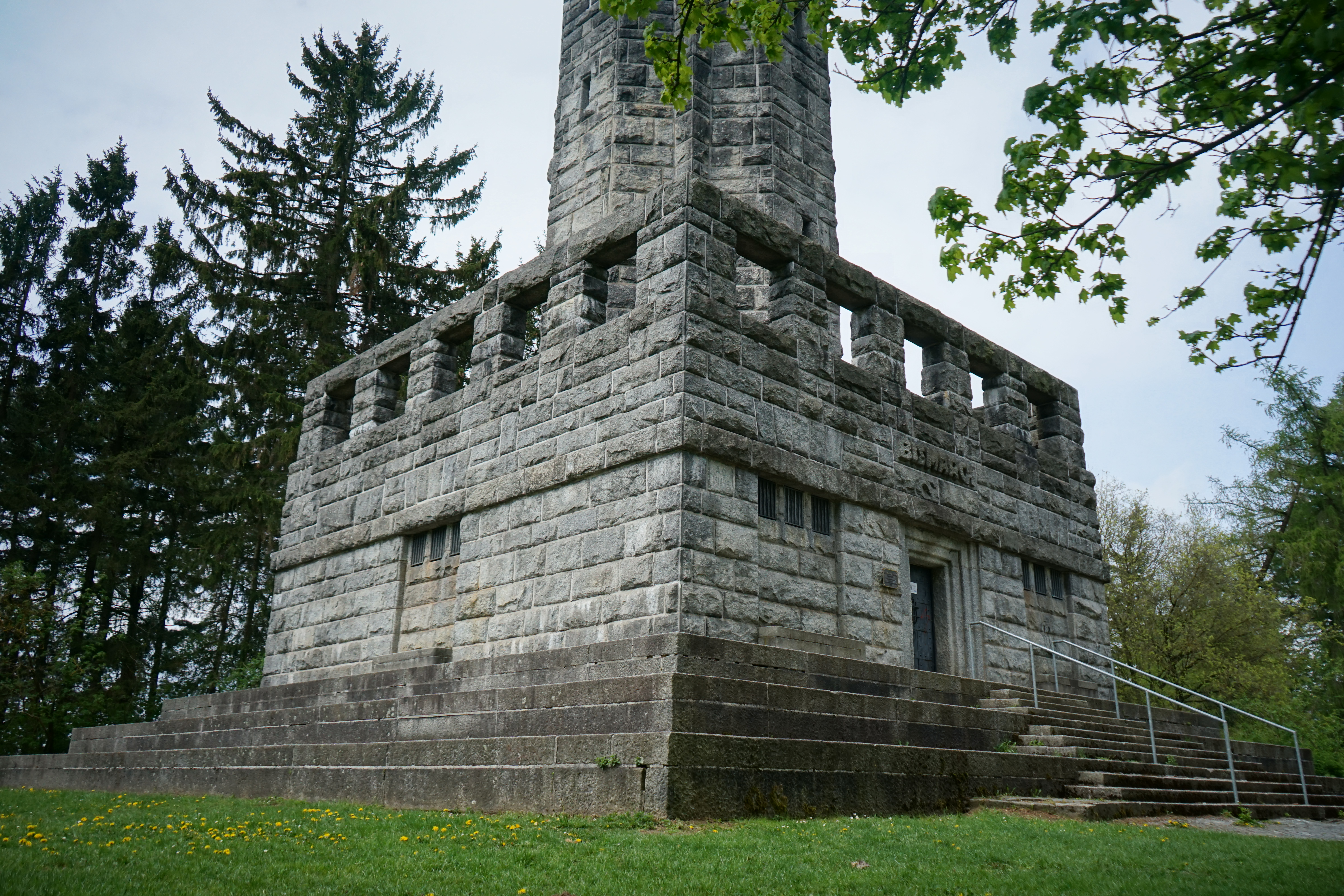 Ansicht von einer Sitzbank am Bismarckturm (Hof).